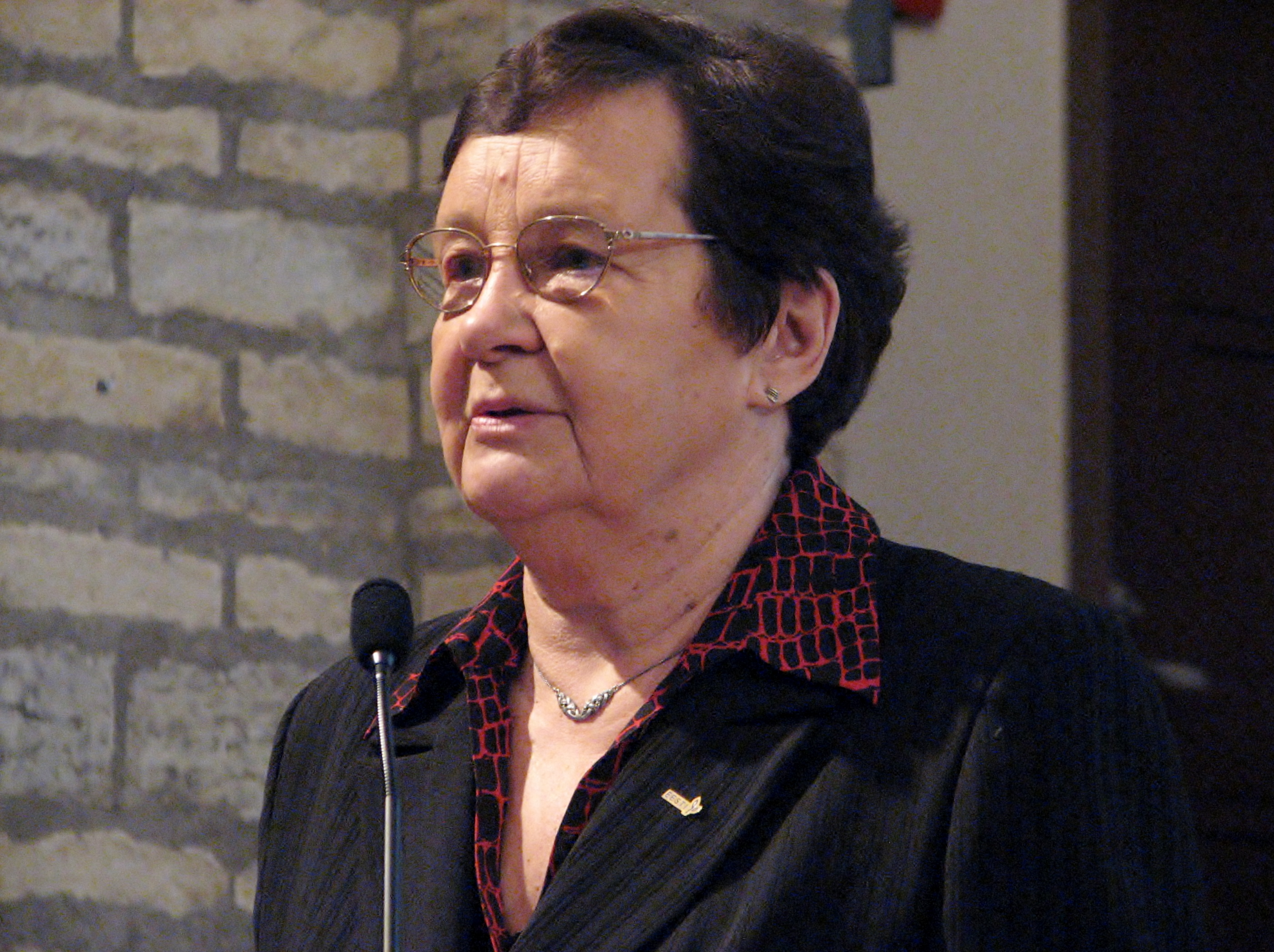 Anne Valmas Eesti Raamatukoguhoidjate Ühingu koosolekul